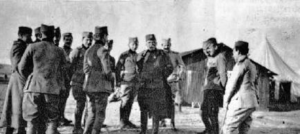 Skupina slovenskih prostovoljskih častnikov Jugoslovanske prostovoljske divizije s polkovnikom Jankom Vukasovičem v sredini, meseca januarja 1918 v Mikri pri Solunu.